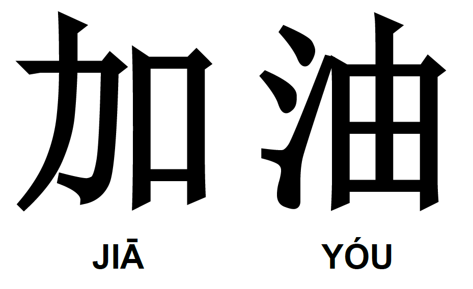 Tatovering